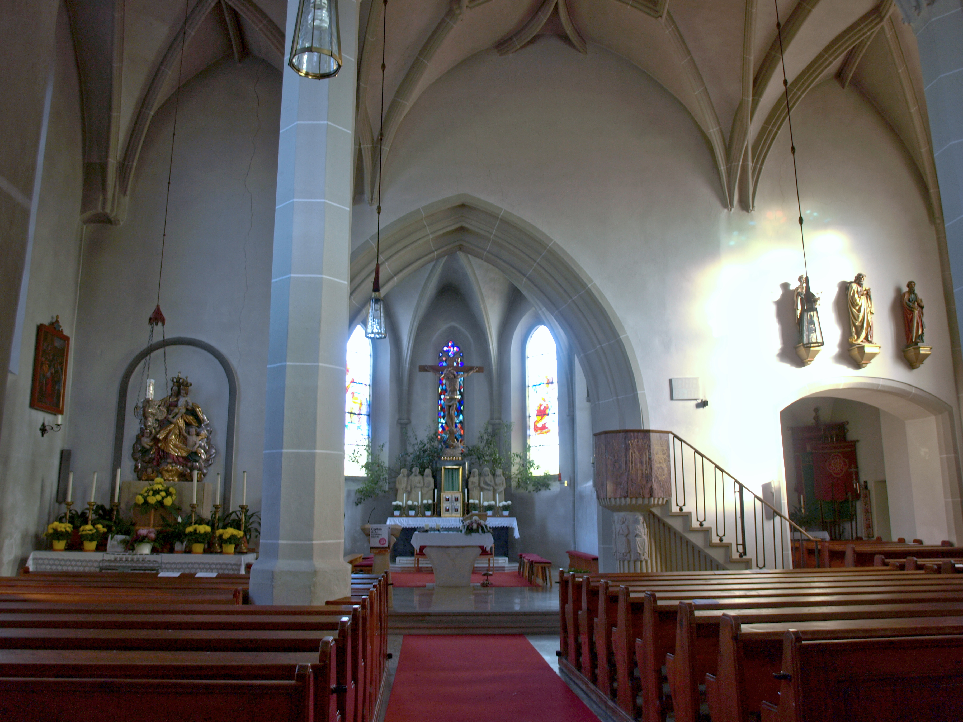 Kath. Pfarrkirche hl. Jakobus der Ältere